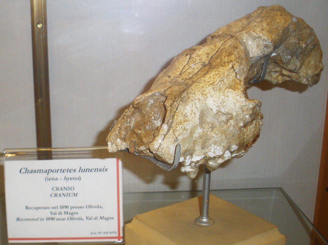 Fossil of Chasmaporthetes, an extinct mammal - Took the picture at Museo di Paleontologia di Firenze